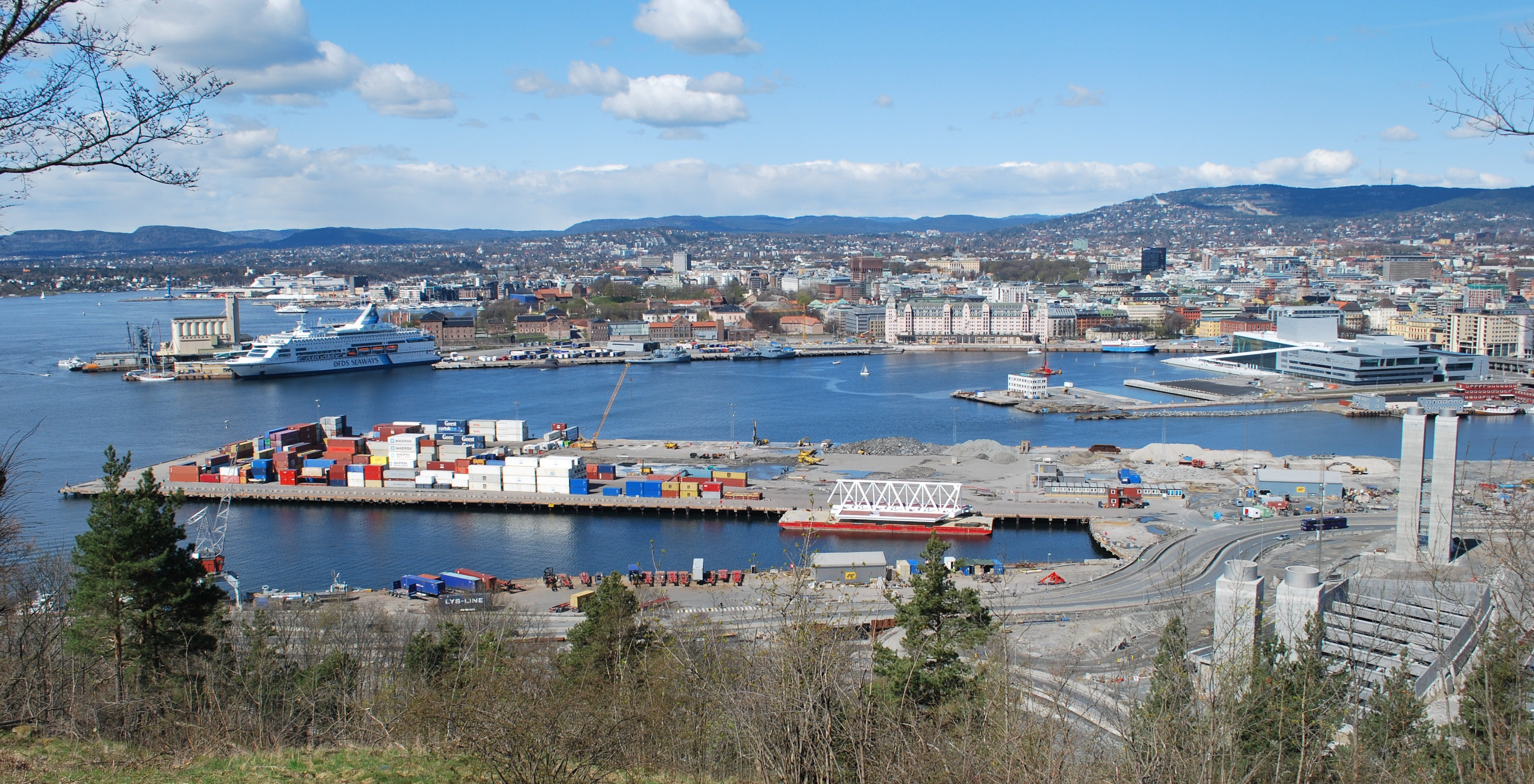 Norsk (bokmål): Sørengautstikkeren, Sørenga, Oslo, som blir boligområde fram til 2019